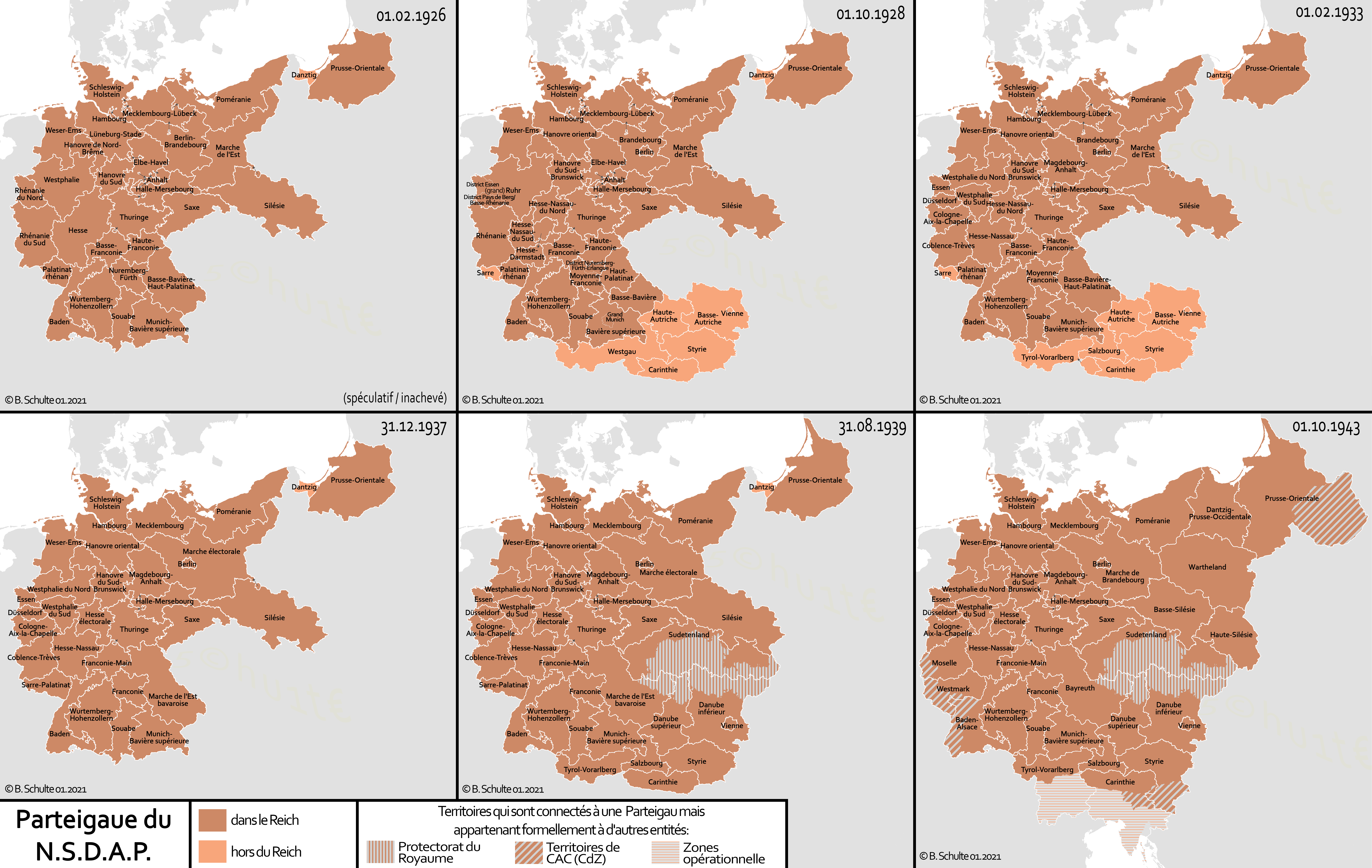 Cartes de la partie organisation administrative du NSDAP en Parteigaue (aussi à l'extérieur du Reich allemand). Ce n'est pas identique à la structure de l'État, par exemple de Reichsgaue.